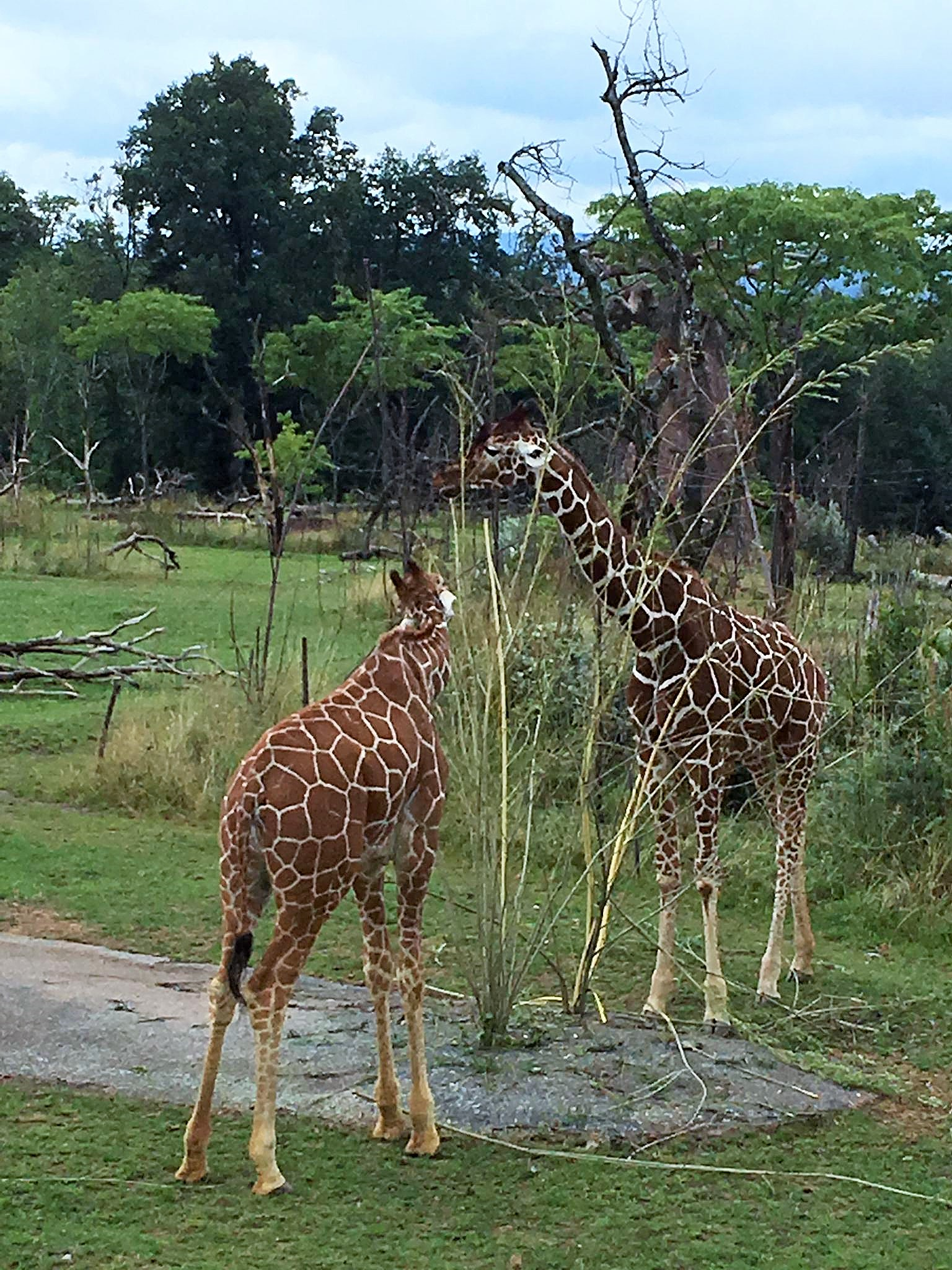 Zürich Zoo 2020